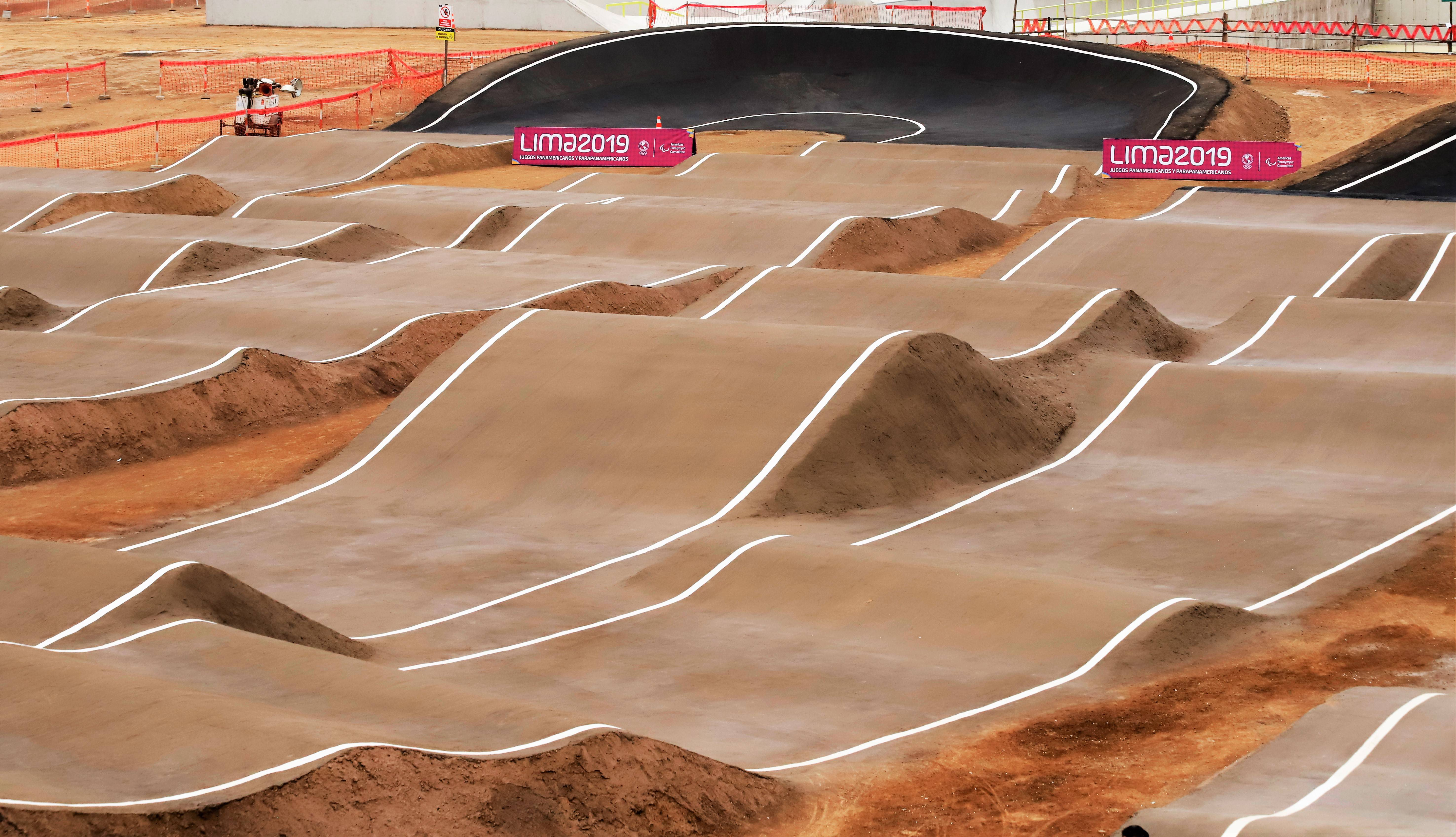 Sede de los Juegos Panamericanos y Parapanamericanos de 2019